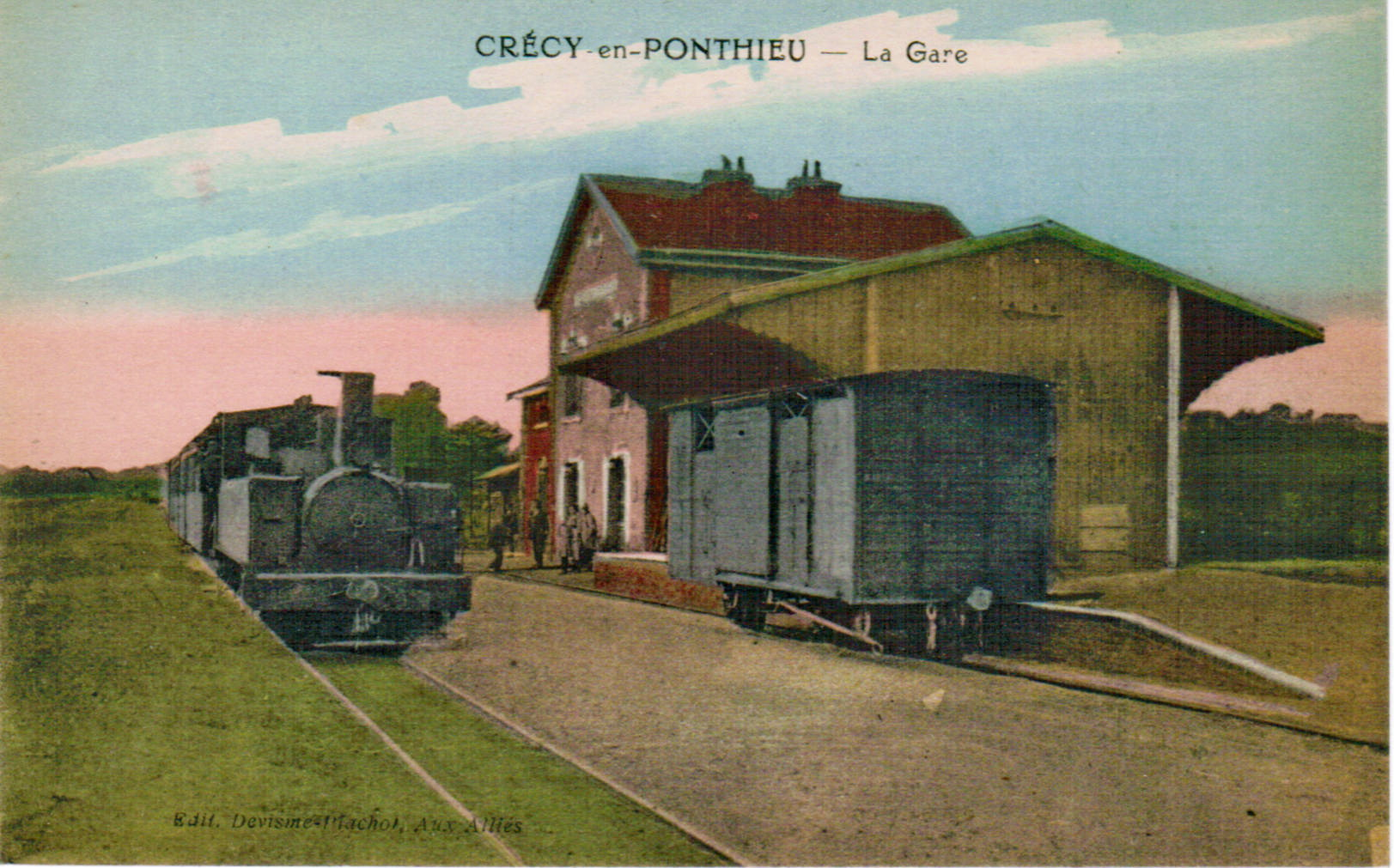 Carte postale ancienne éditée par Devisine-Plachot, Aux AlliésCRECY-EN-PONTHIEU - La GareIl s'agit d'une gare des Chemins de fer départementaux de la Somme